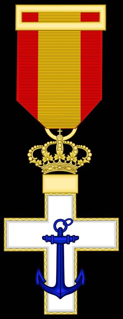 Cruz al Mérito Naval con distintivo blanco